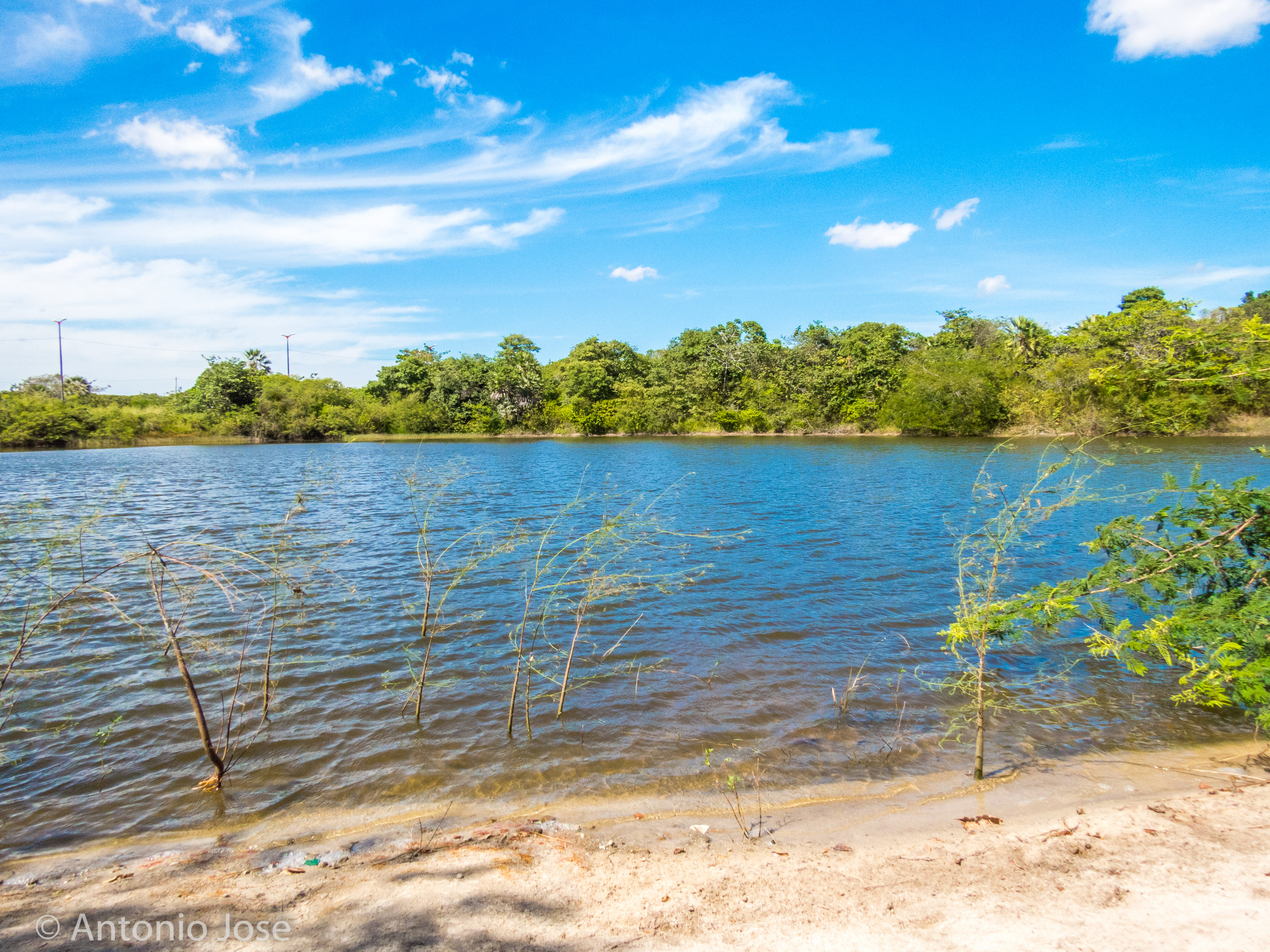 Parque Botânico de Caucaia no Ceará